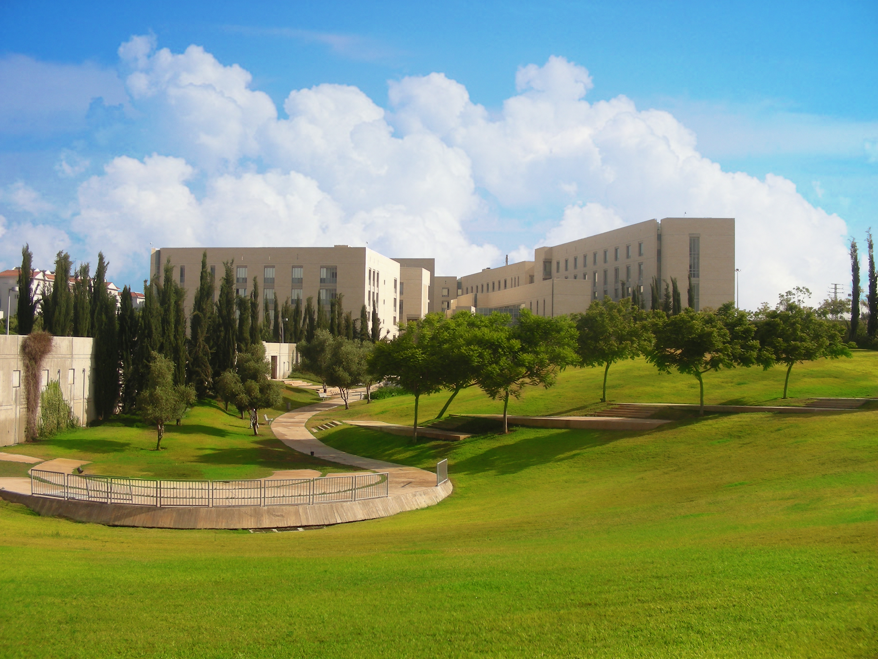 קמפוס האוניברסיטה הפתוחה ע"ש דורותי דה רוטשילד ברעננה